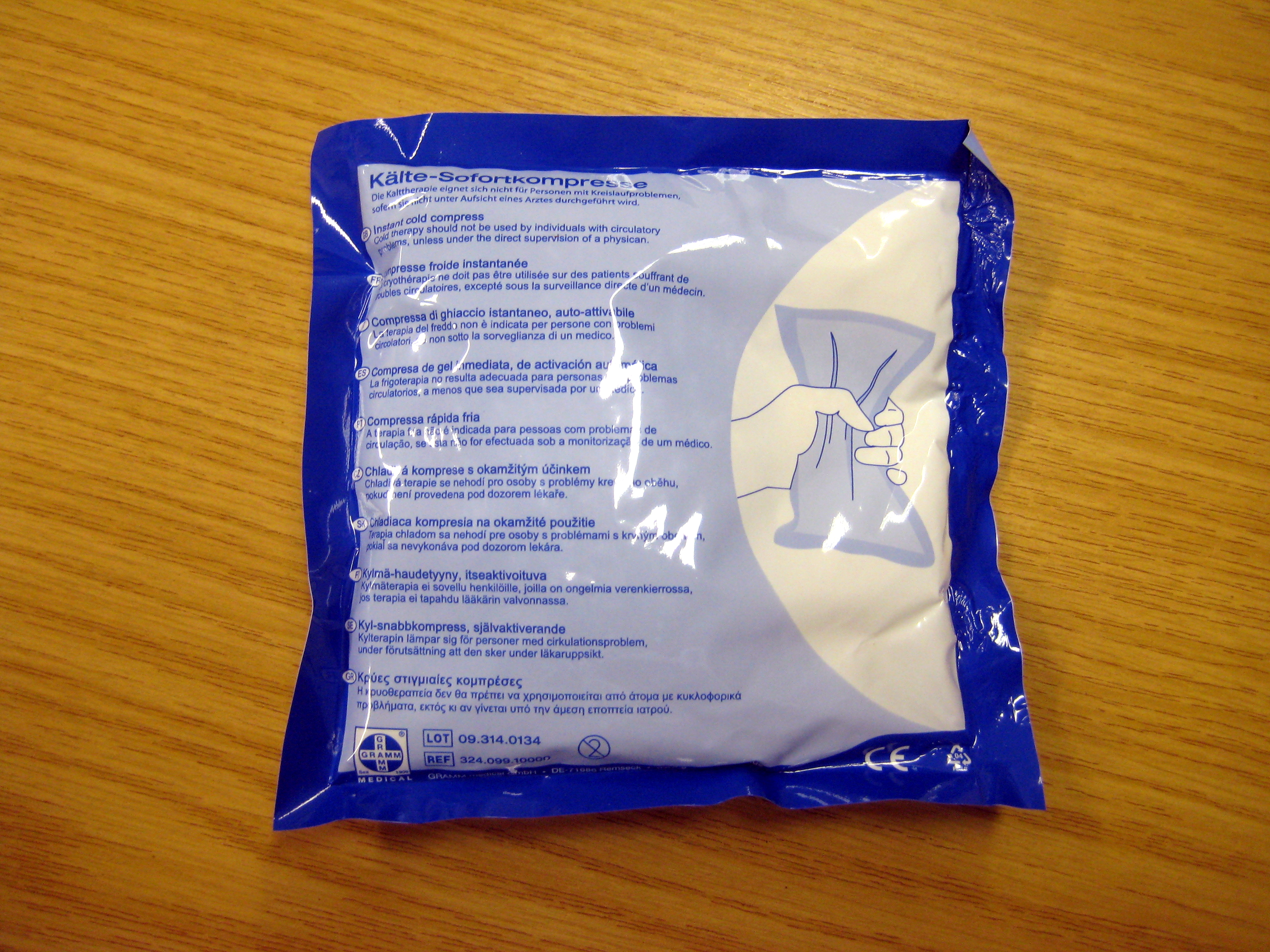 Kältekompresse zur ersten Hilfe